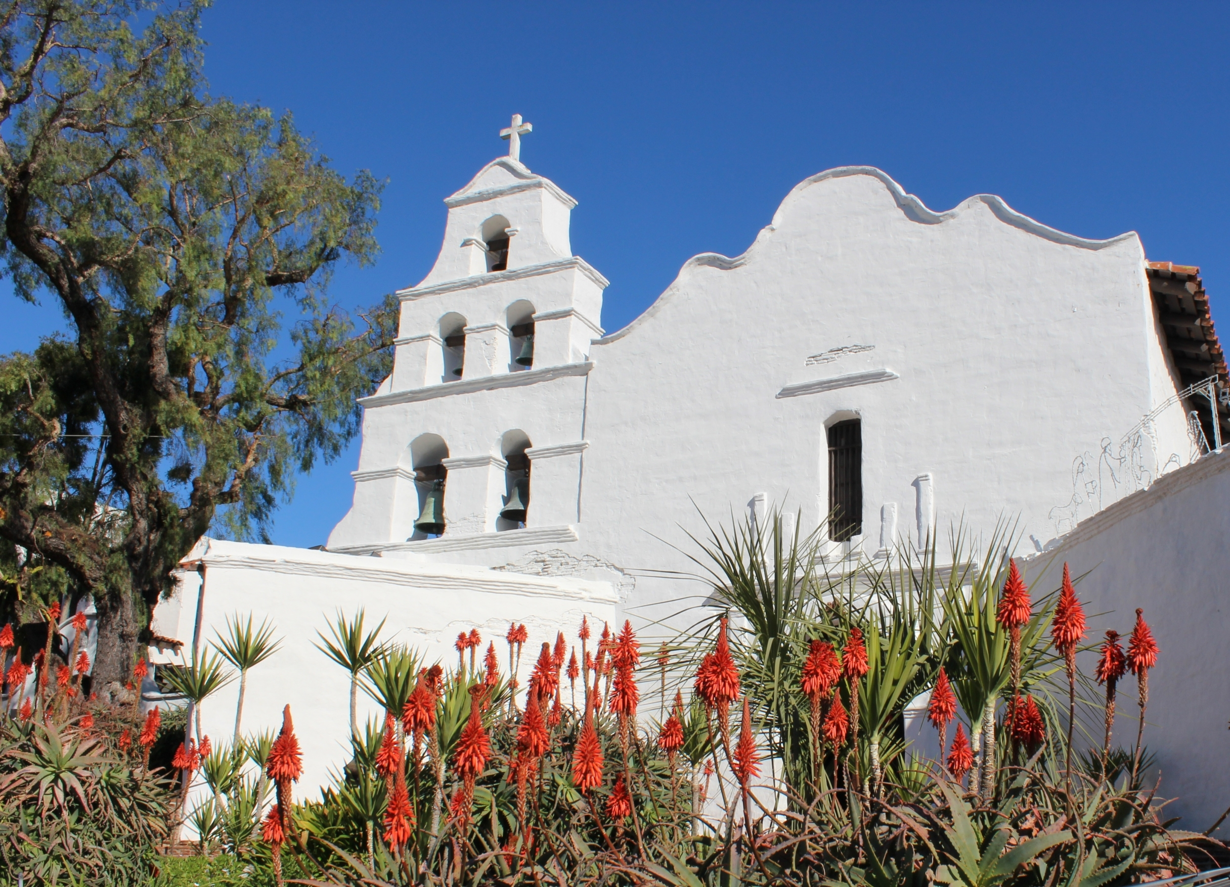 San Diego, CA USA - Mission San Diego de Alcala * 1769 * / 1st mission/